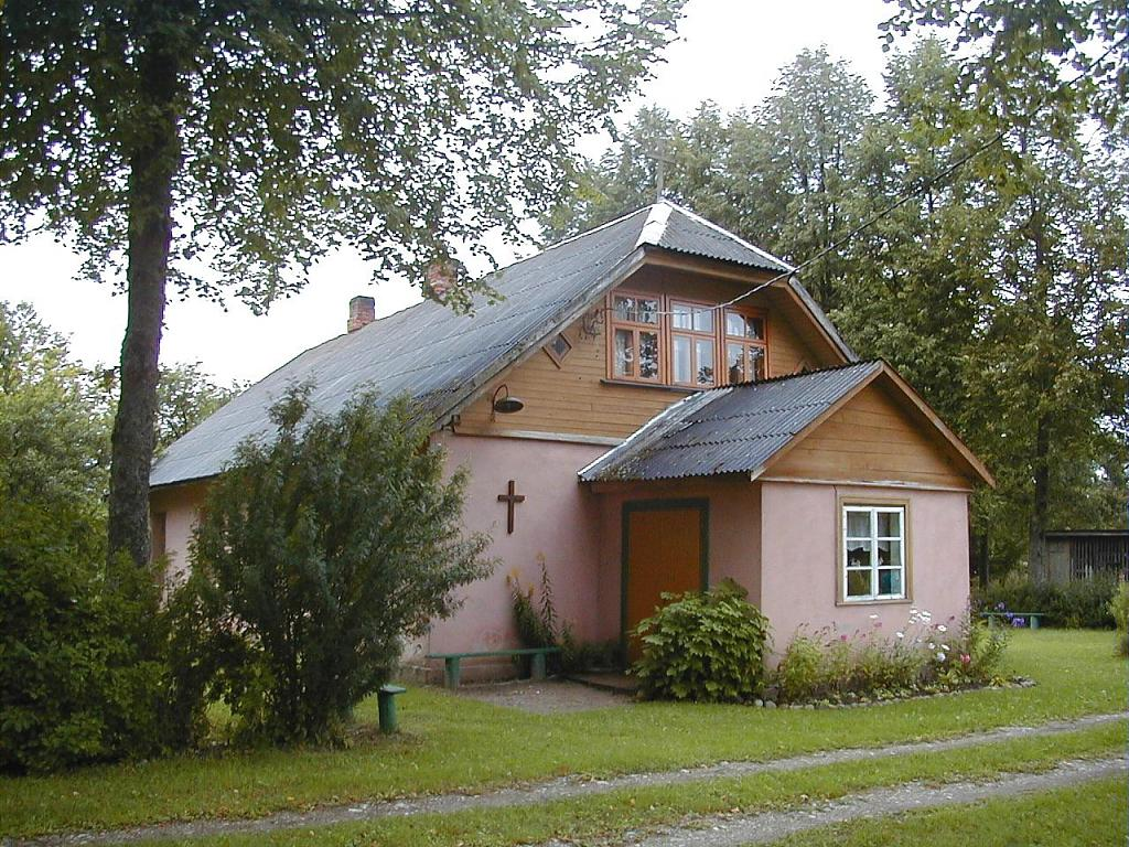 Cīruļu baptistu baznīca 2004-08-13